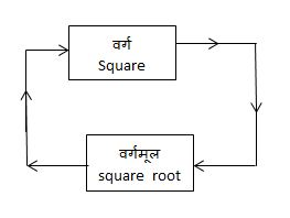 नेपाली: वर्ग , वर्ग मूल